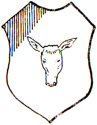 Herb wsi Jarczów, gmina Jarczów.